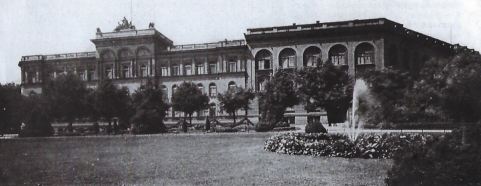 Gebäude des Preußischen Generalstabes in Berlin